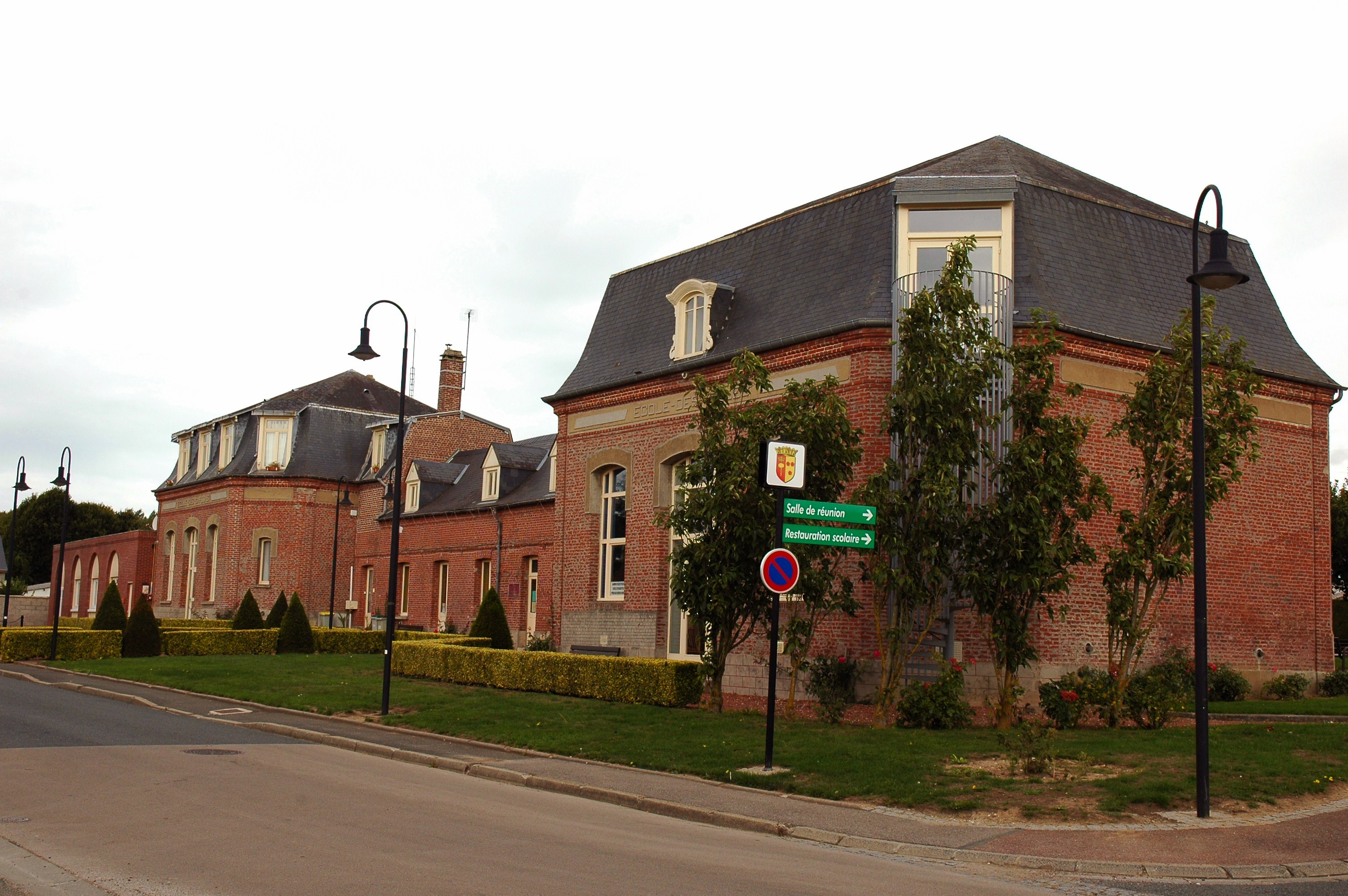 Feuquières-en-Vimeu (Somme, France). .